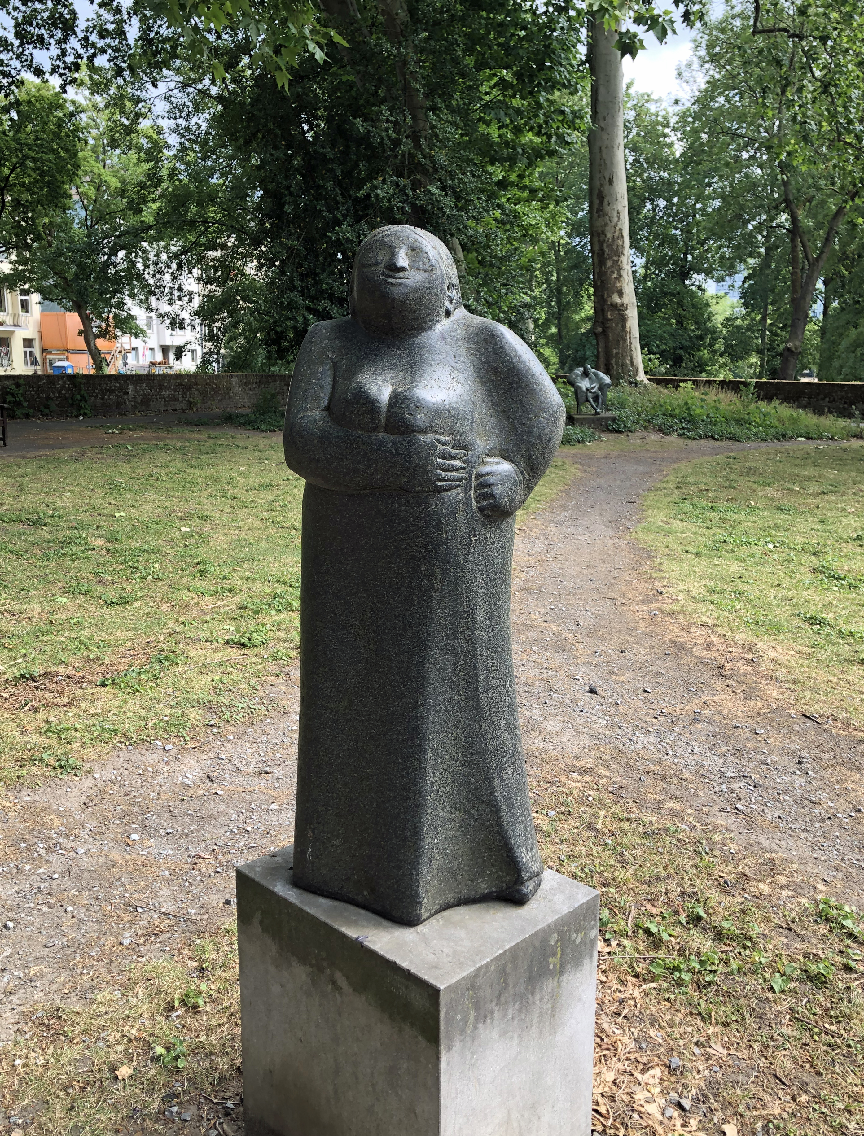 Mutter Ey von Hannelore Köhler in der Parkanlage des Palais Spee, Düsseldorf-Carlstadt